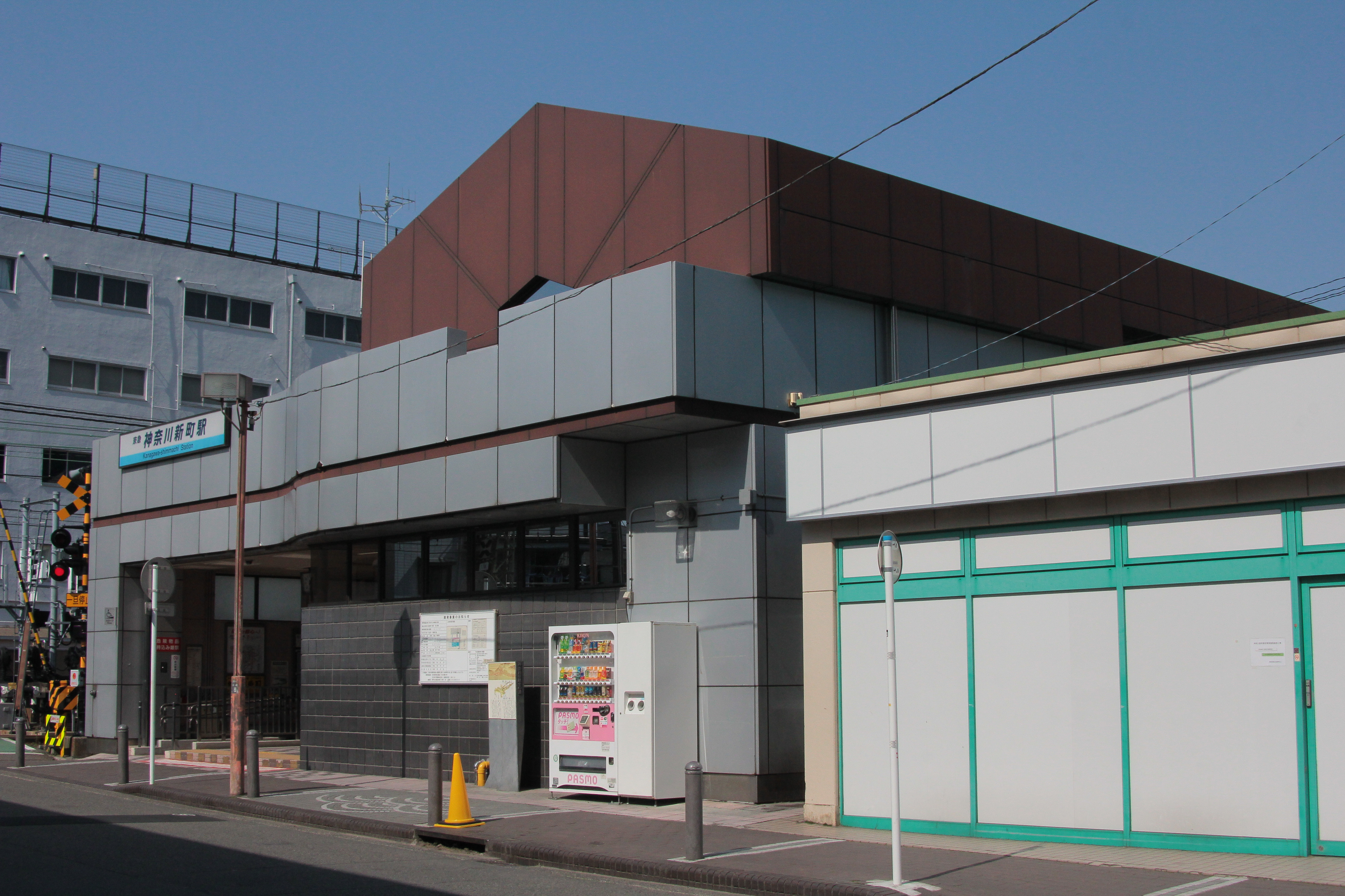 京急本線 神奈川新町駅 中央口駅舎(2014年3月)